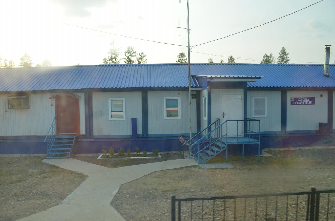 Поездка 5-6 августа 2019 г. по маршруту Якутск - Нерюнгри - Якутск во вновь назначенном поезде № 327 Нижний Бестях - Нерюнгри. Историческое событие - пуск пассажирского движения поездов из центральной Якутии, почти из Якутска.Железнодорожный разъезд Болотный (383 км)